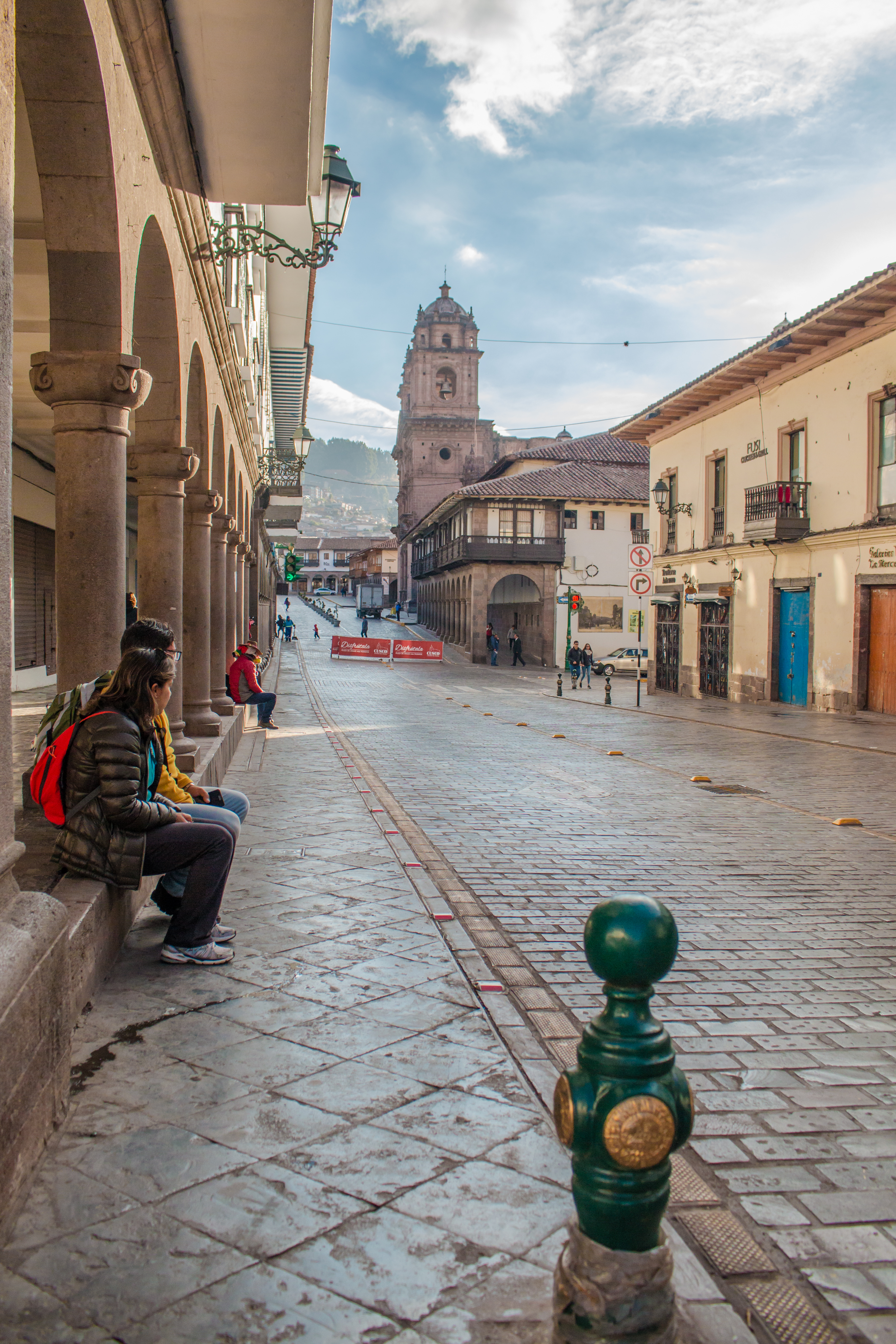 Céntrica Calle Mantas, debajo de ésta calle se encuentran restos de escalones Incas. Al fondo se aprecia la Iglesia de la Compañía de Jesús